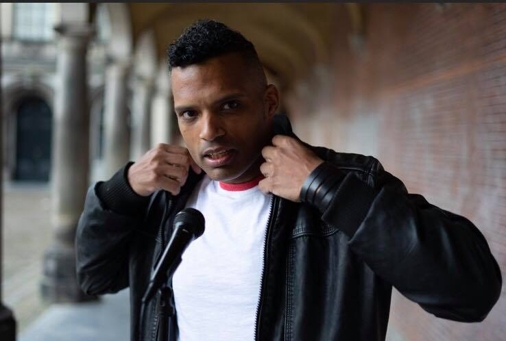 foto Chris